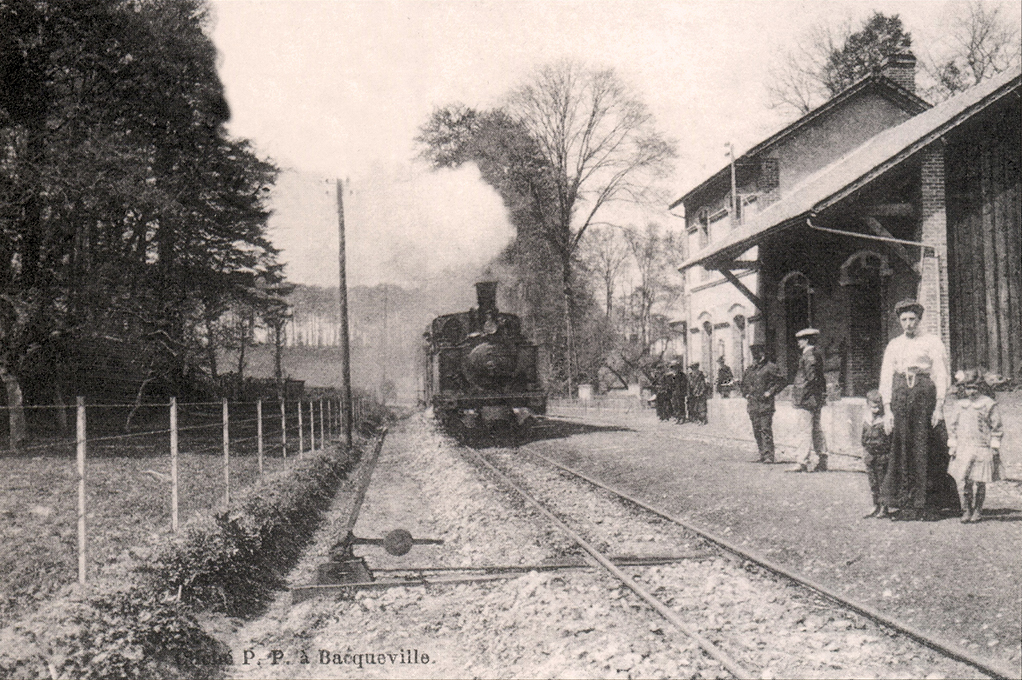 Gare de Bacqueville-en-Caux sur le Chemin de fer de Normandie